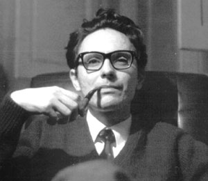 Foto scattata a Giorgio Antonucci, collaboratore di Franco Basaglia, con la sua approvazione di divulgazione nel 1975